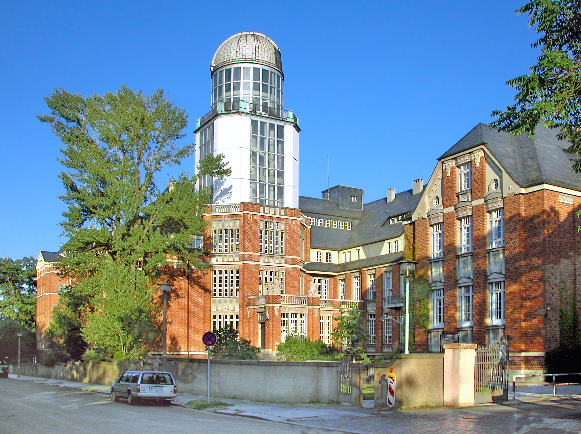 07.07.2007 01069 Dresden-Südvorstadt, George-Bähr-Straße 1 (GMP: 51.029752,13.729214): Beyer-Bau der TU Dresden. 1910-1913 nach Plänen des Architekten Martin Dülfer erbaut und 1953 nach dem Bauingenieur Kurt Beyer benannt. Landmarke ist der 40 m hohe Turm des Lohrmann-Observatoriums Ansicht von der George-Bähr-Straße. [DSCN28366.TIF]20070707200DR.JPG(c)Blobelt